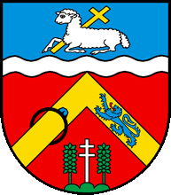 Wappen von Le-Glebe Kanton Freiburg Schweiz